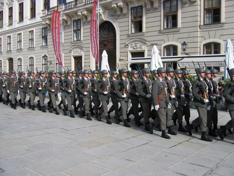 חיילי צבא אוסטריה צועדים בסך בטקס חילופי פיקוד בהופבורג בווינה